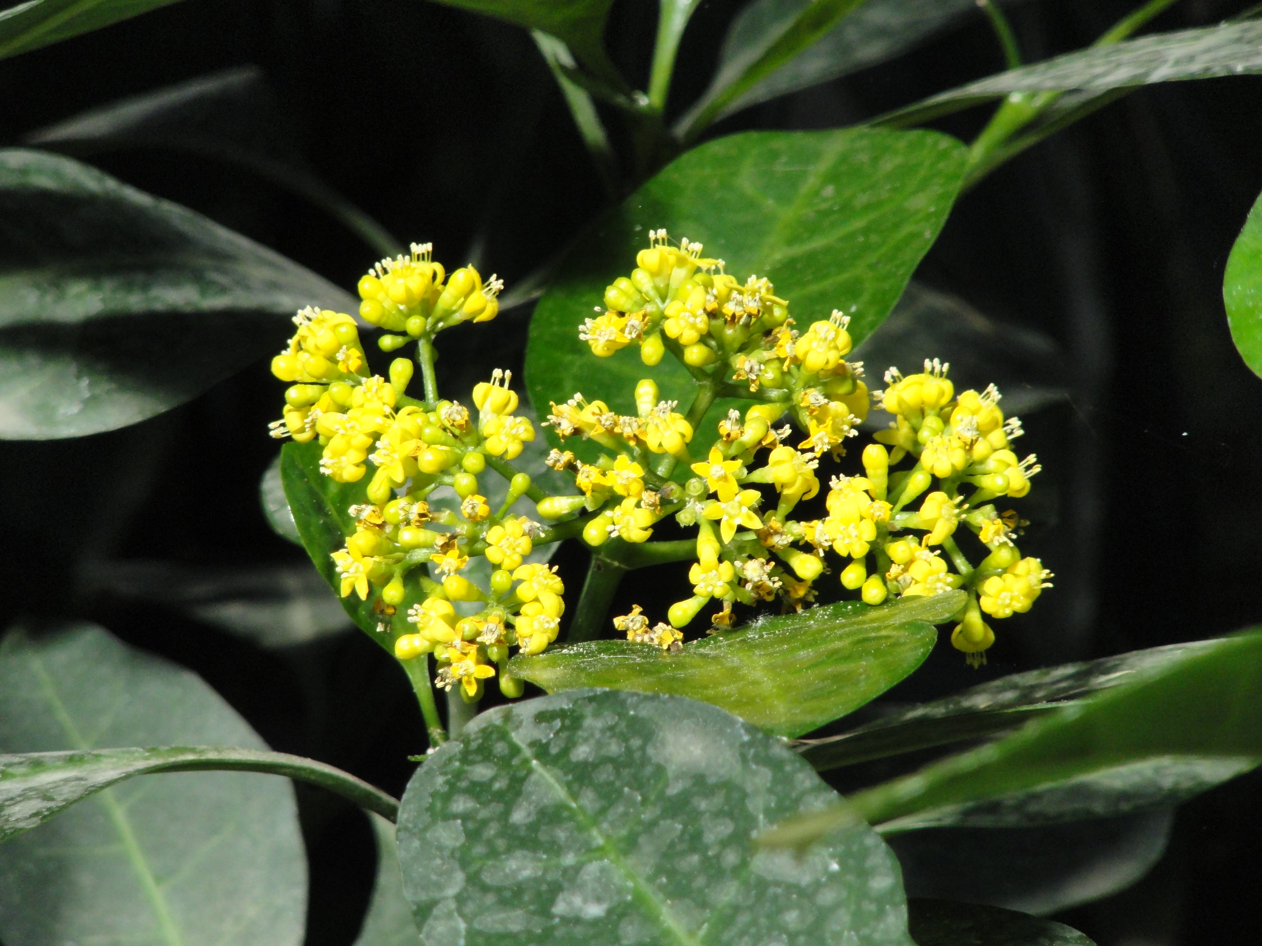 Psychotria capensis specimen in the Jardin Botanique de Lyon, Parc de la Tête d'Or, Lyon, France.